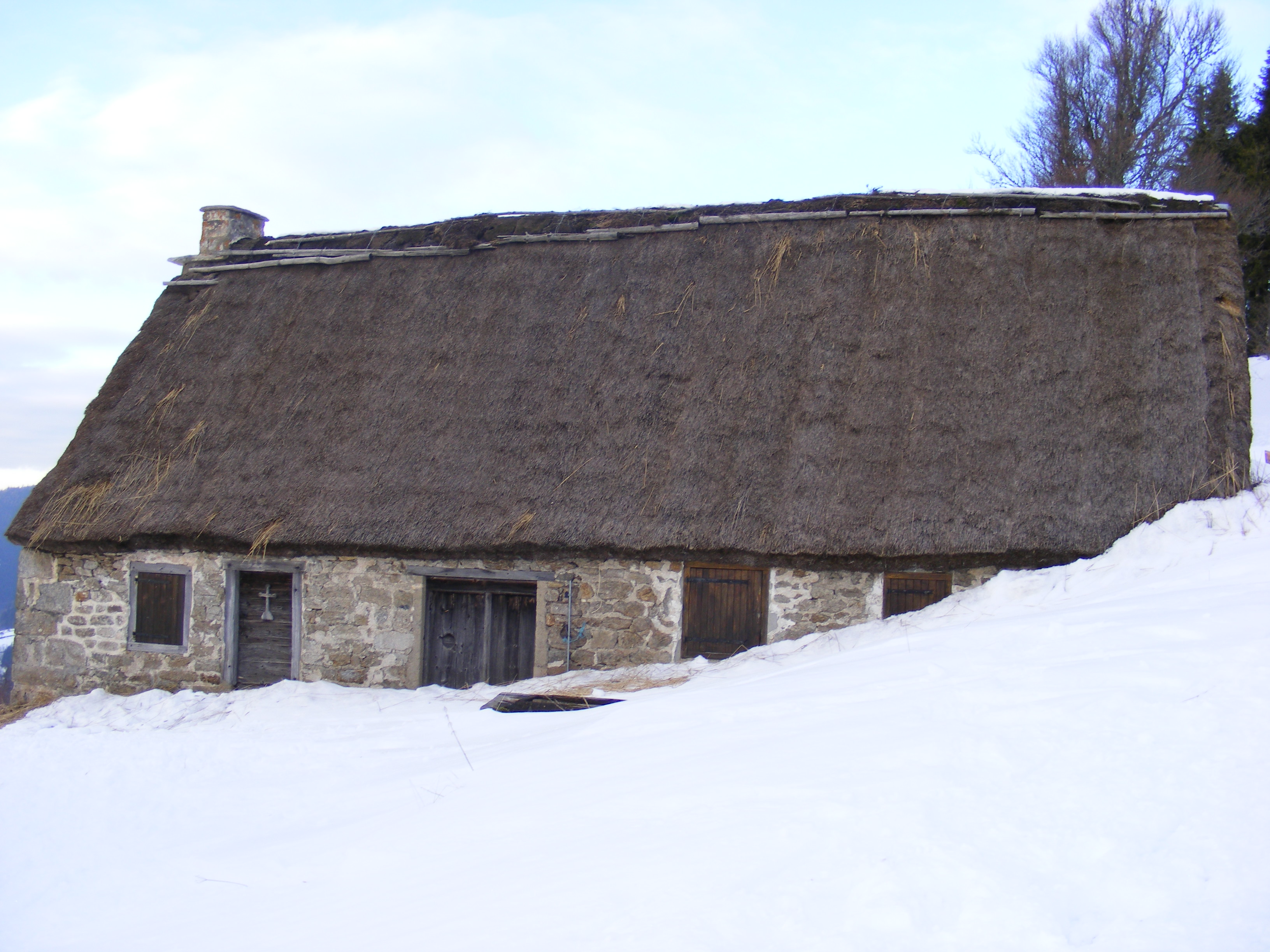 Jasserie typique des hautes chaumes. Col des supeyres, randonnée du colporteur des jasseries